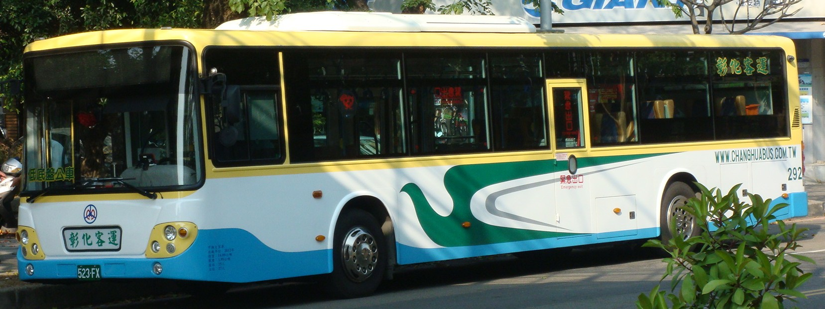 彰化客運大宇BS120CN低地板公車523-FX行駛臺中市公車52路，拍攝時已收班。